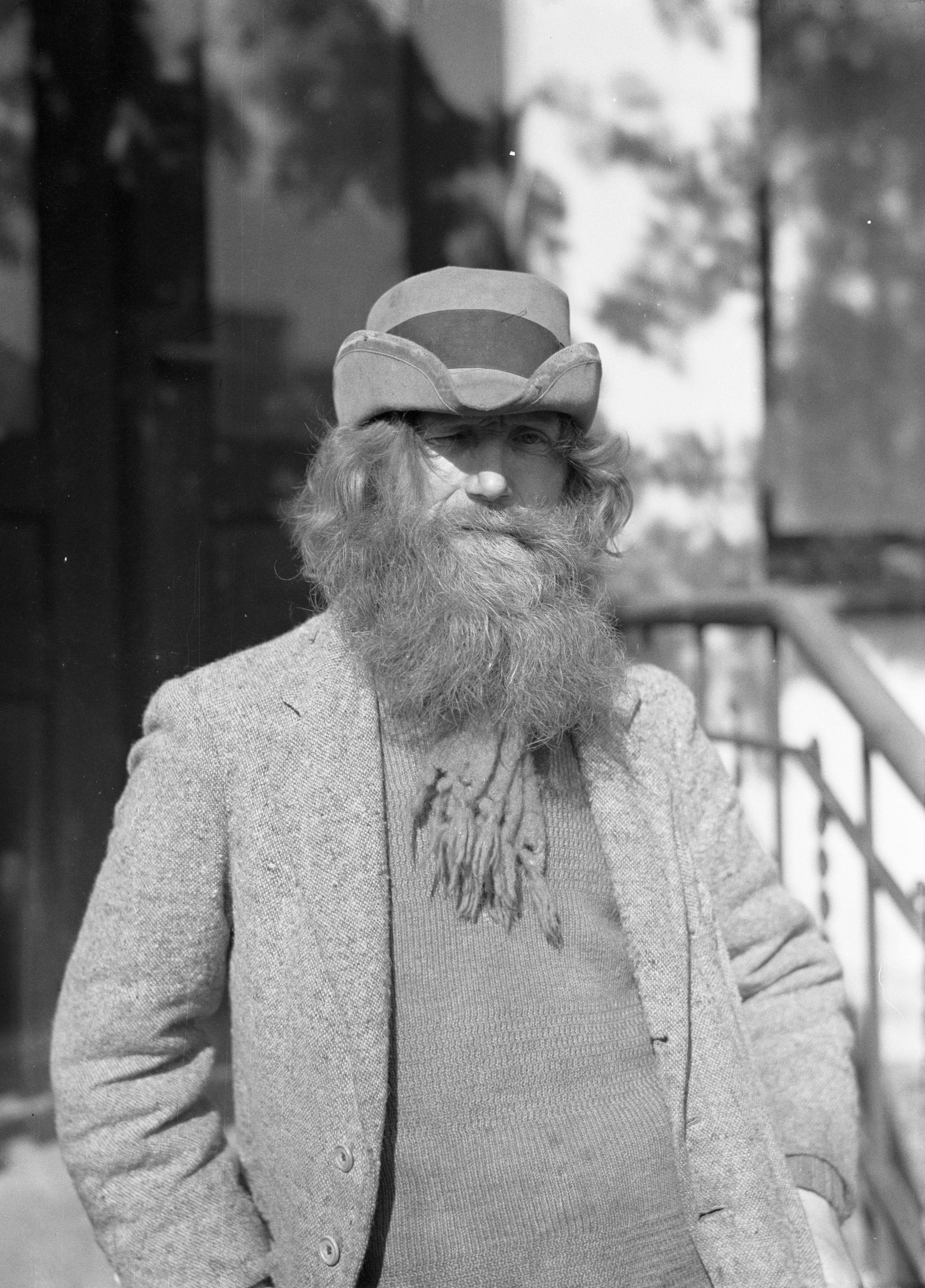 Collectie / Archief : Fotocollectie Van de Poll Reportage / Serie : IJsland Beschrijving : Een oudere IJslandse man met volle baard en hoed Annotatie : Het zou hier gaan om Oddur Sigurgeirsson Datum : 1934 Locatie : IJsland Trefwoorden : baarden, hoofddeksels, mannen, portretten Fotograaf : Poll, Willem van de Auteursrechthebbende : Nationaal Archief Materiaalsoort : Glasnegatief Nummer archiefinventaris : bekijk toegang 2.24.14.02 Bestanddeelnummer : 190-0307